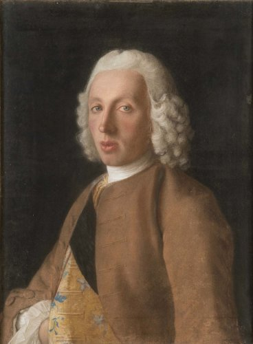 Pastel sur papier marouflé sur toile - 65 x 49 cm Préempté par le Musée de l’Armée Photo : Cabinet De Bayser